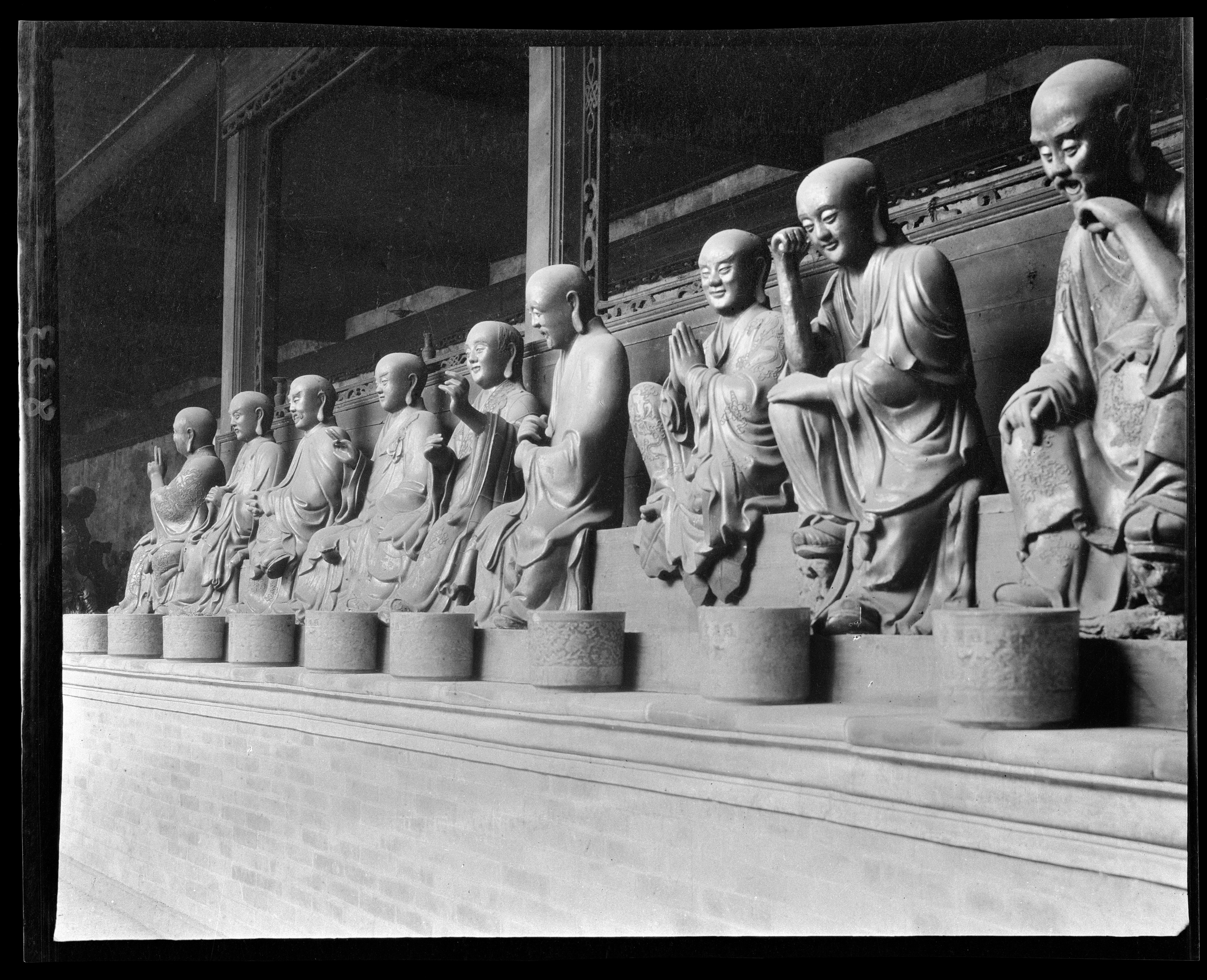 廣州華林寺內的五百羅漢像